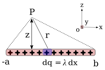 Line charge